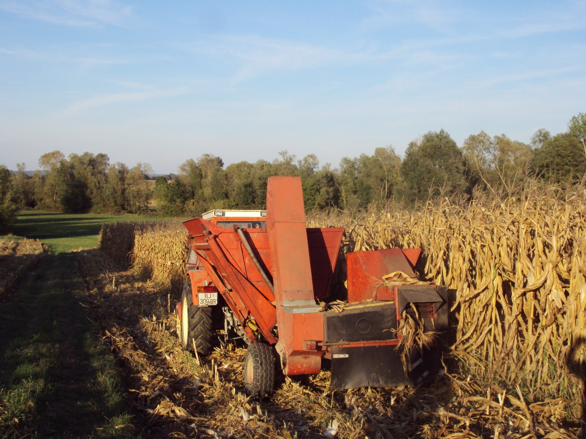 Branje kukuruza, Bulinac kraj Bjelovara